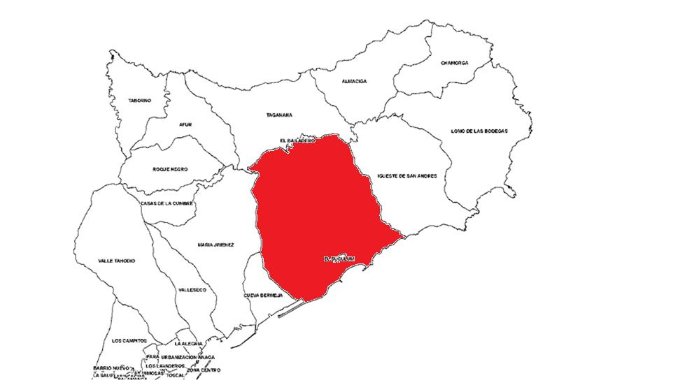 Localización de San Andrés